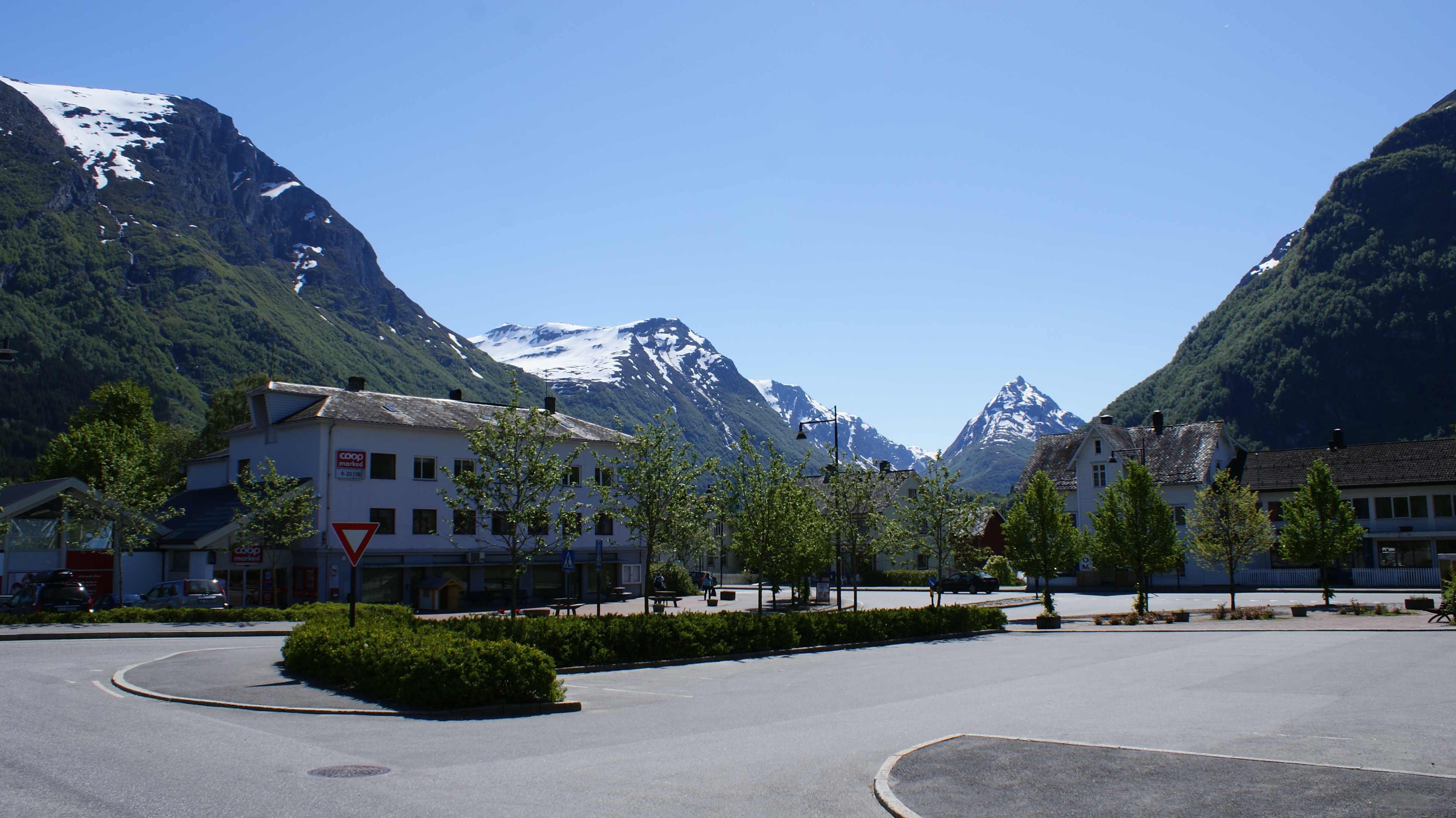 Byrkjelo, Sogn og Fjordane, Norway. Eggjenibba in the background.